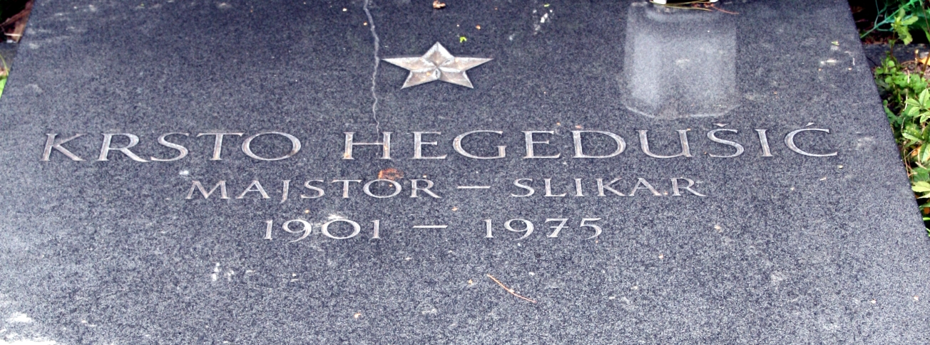 grob Krste Hegedušića na Mirogoju u Zagrebu